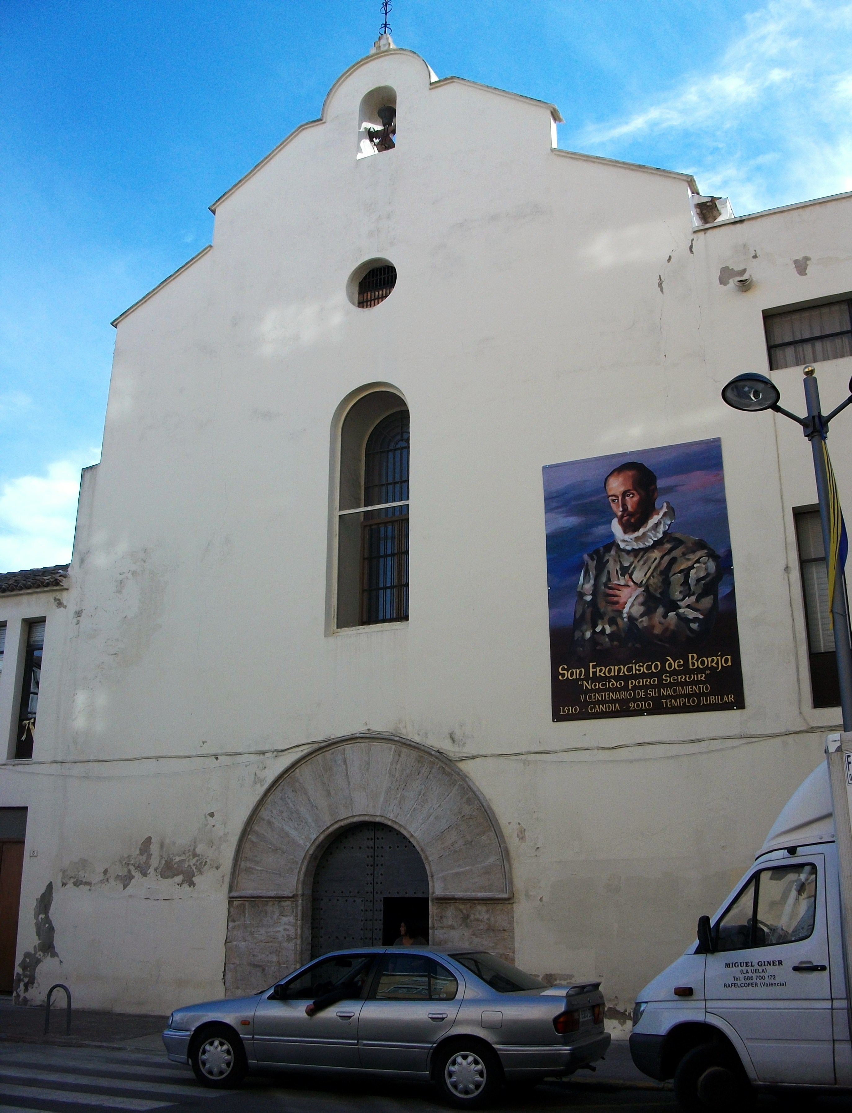 Façana de l'església de santa Clara de Gandia.